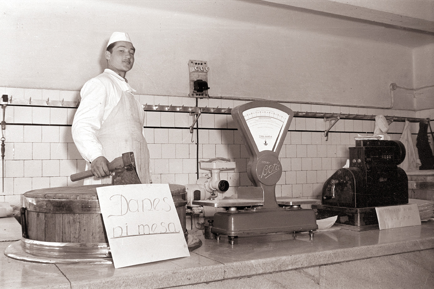 Napis danes ni mesa v ljubljanski mesariji